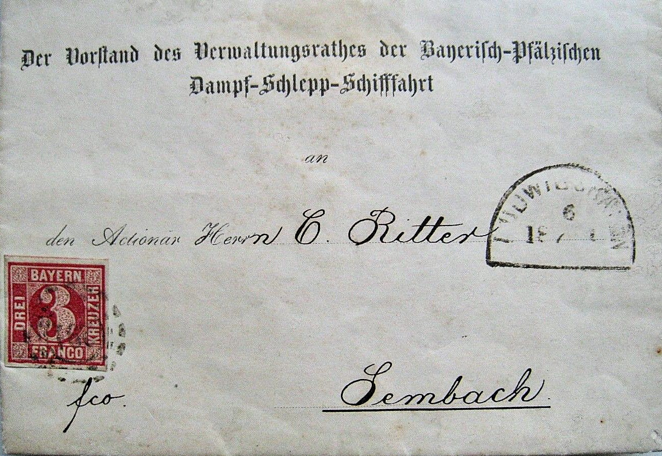 Briefkuvert der Bayerisch-Pfälzischen Dampf-Schlepp-Schifffahrts-Gesellschaft, 1867